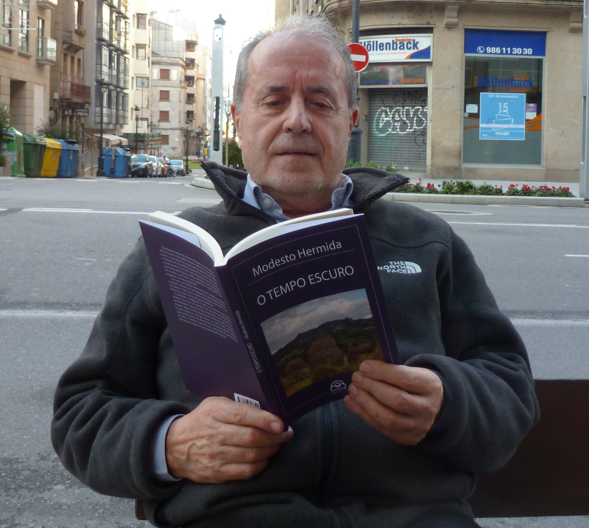 O escritor Modesto Hermida lendo no seu libro "O tempo escuro" en Vigo